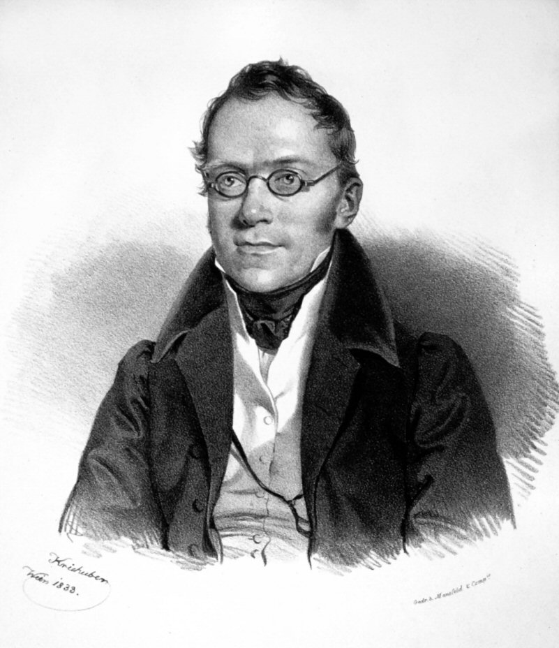 Carl Czerny, Lithographie von Josef Kriehuber, 1833